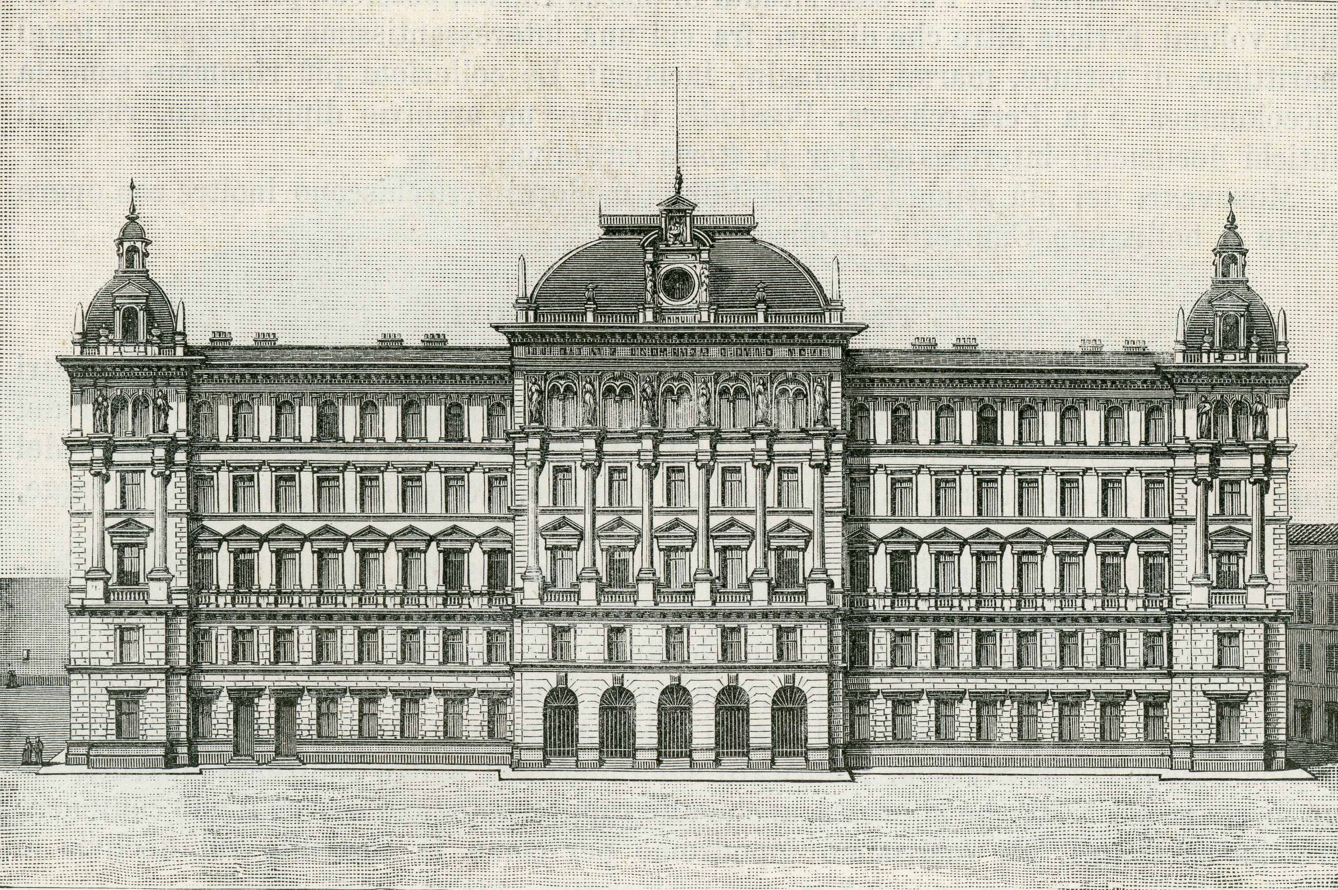 Trieste: palazzo delle poste e telegrafi, (xilografia di Barberis).